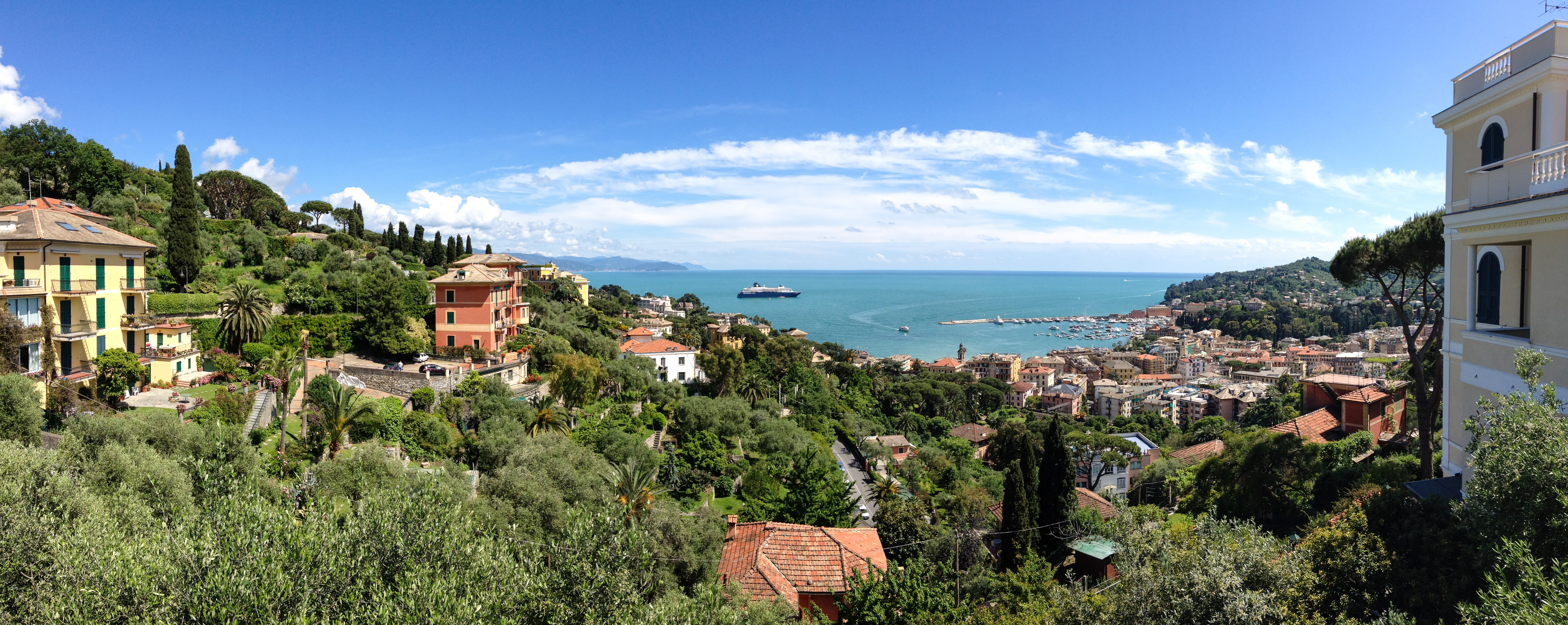 View on Santa Margherita Ligure, Liguria